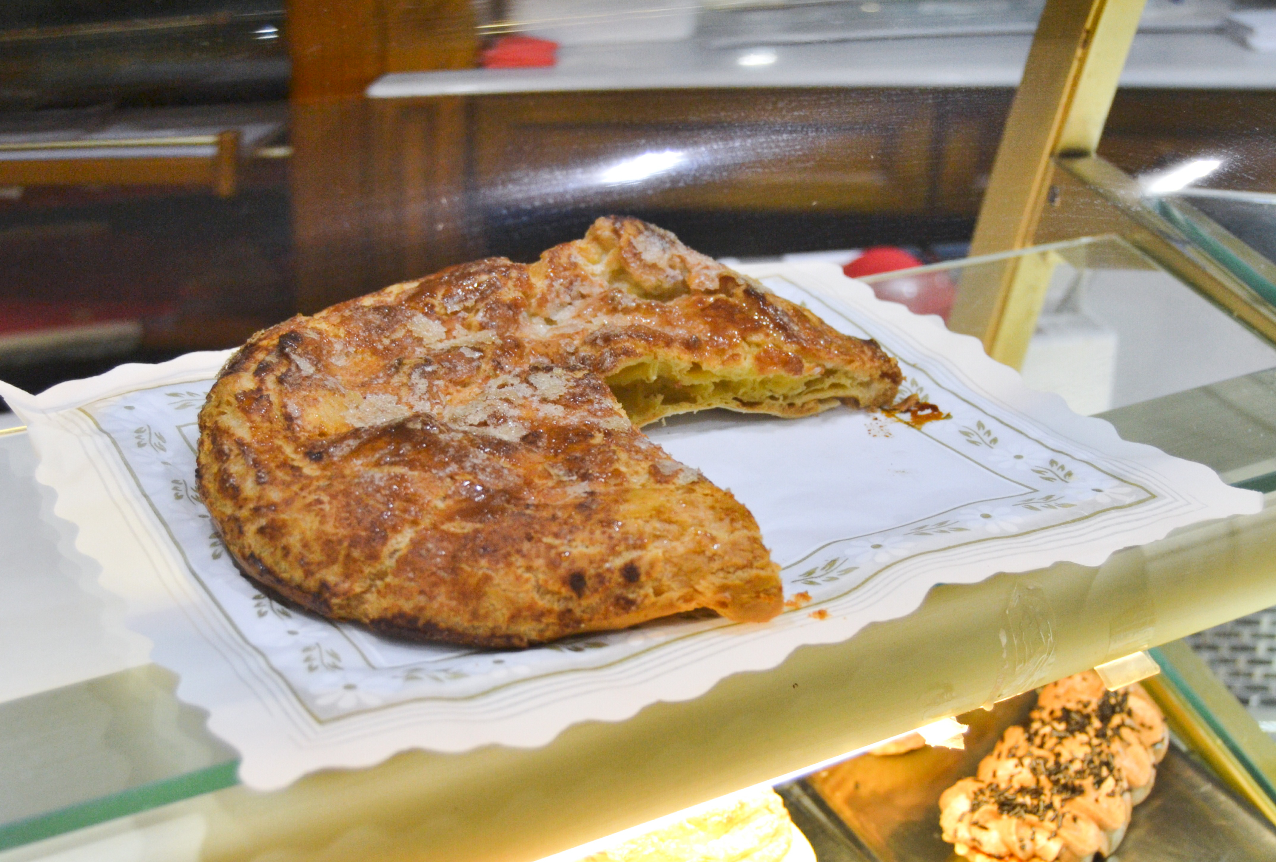 Almoixàvena a una pastisseria de Xàtiva.